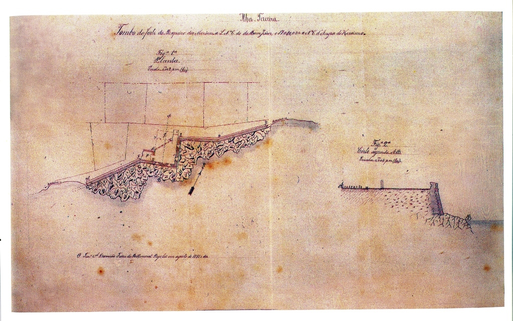 "Tombo do forte do Pesqueiro dos Meninos, ...", Ilha Terceira (Açores), Portugal.